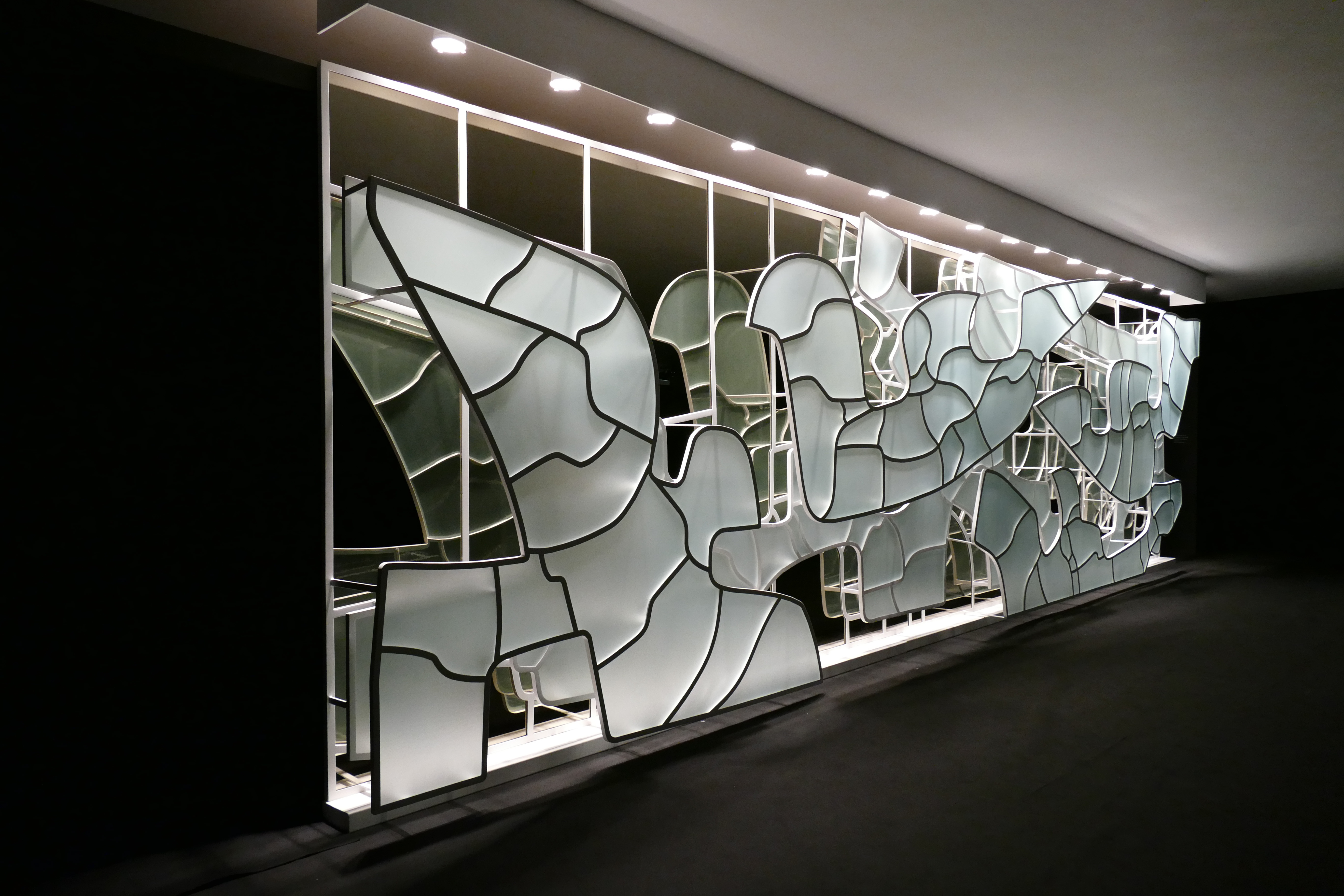 Exposição: A Arte Monumental de Marianne Peretti. Marianne Peretti é pintora, escultora e desenhista. Colaboradora de Oscar Niemeyer em muitos de seus projetos de integração arte-arquitetura. Possui obras no Senado Federal, entre elas, um painel que faz parte da exposição que está em cartaz no Museu Nacional da República. Foto: Roque de Sá / Agência Senado